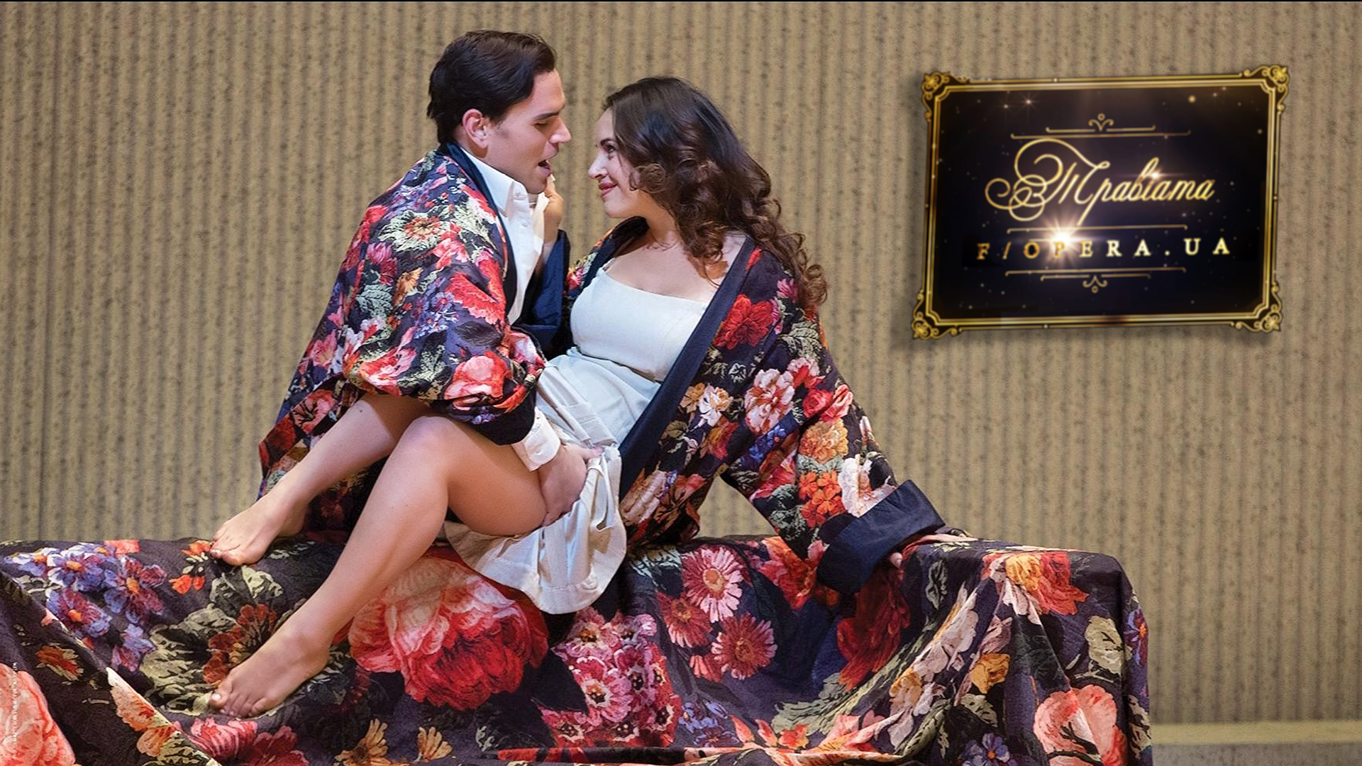 Соня Йончева в ролі Віолетти Валері в опері "Травіата", Метрополітен опера, 2017